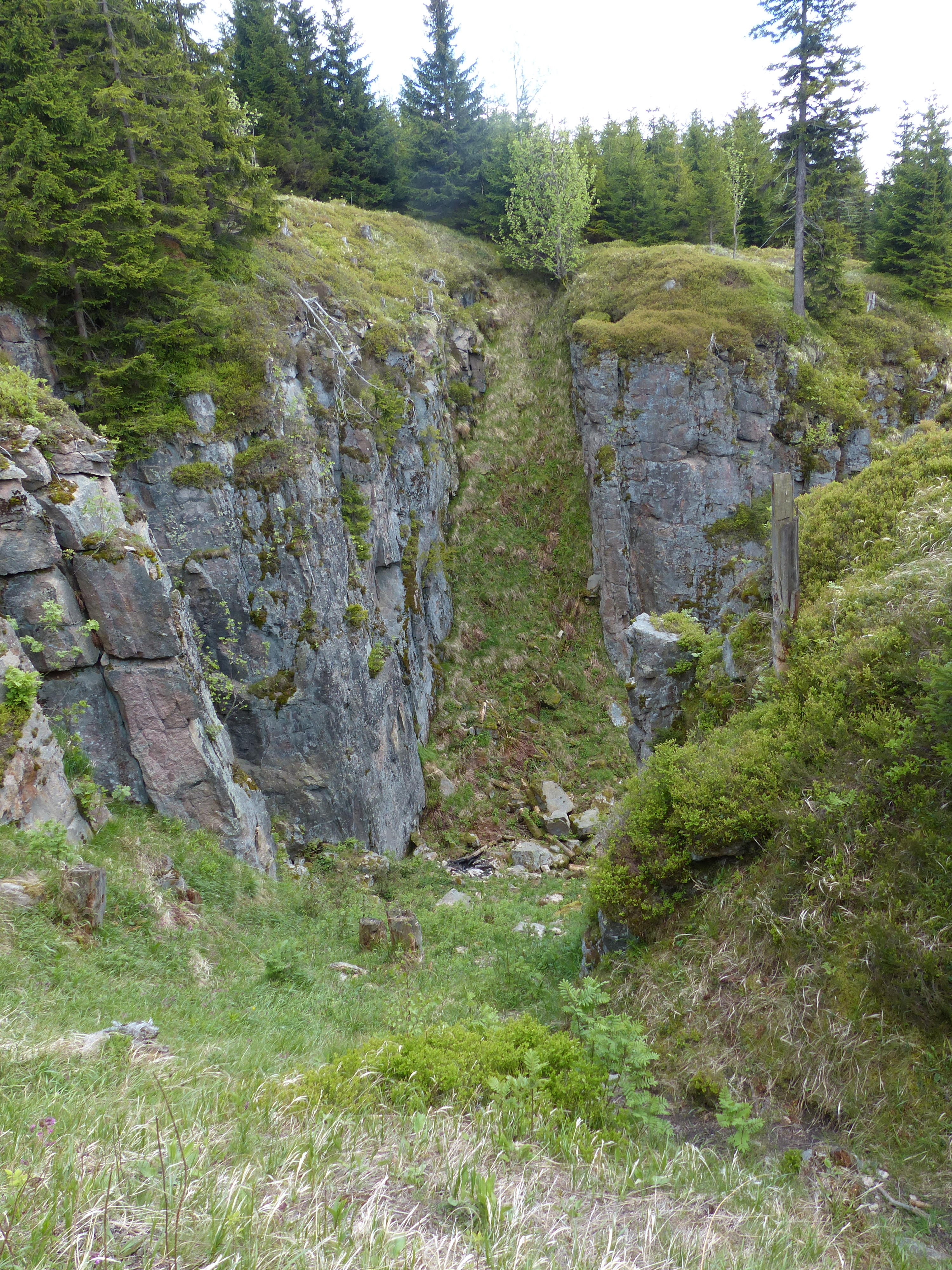 Blatenský vrch, Plattenberg